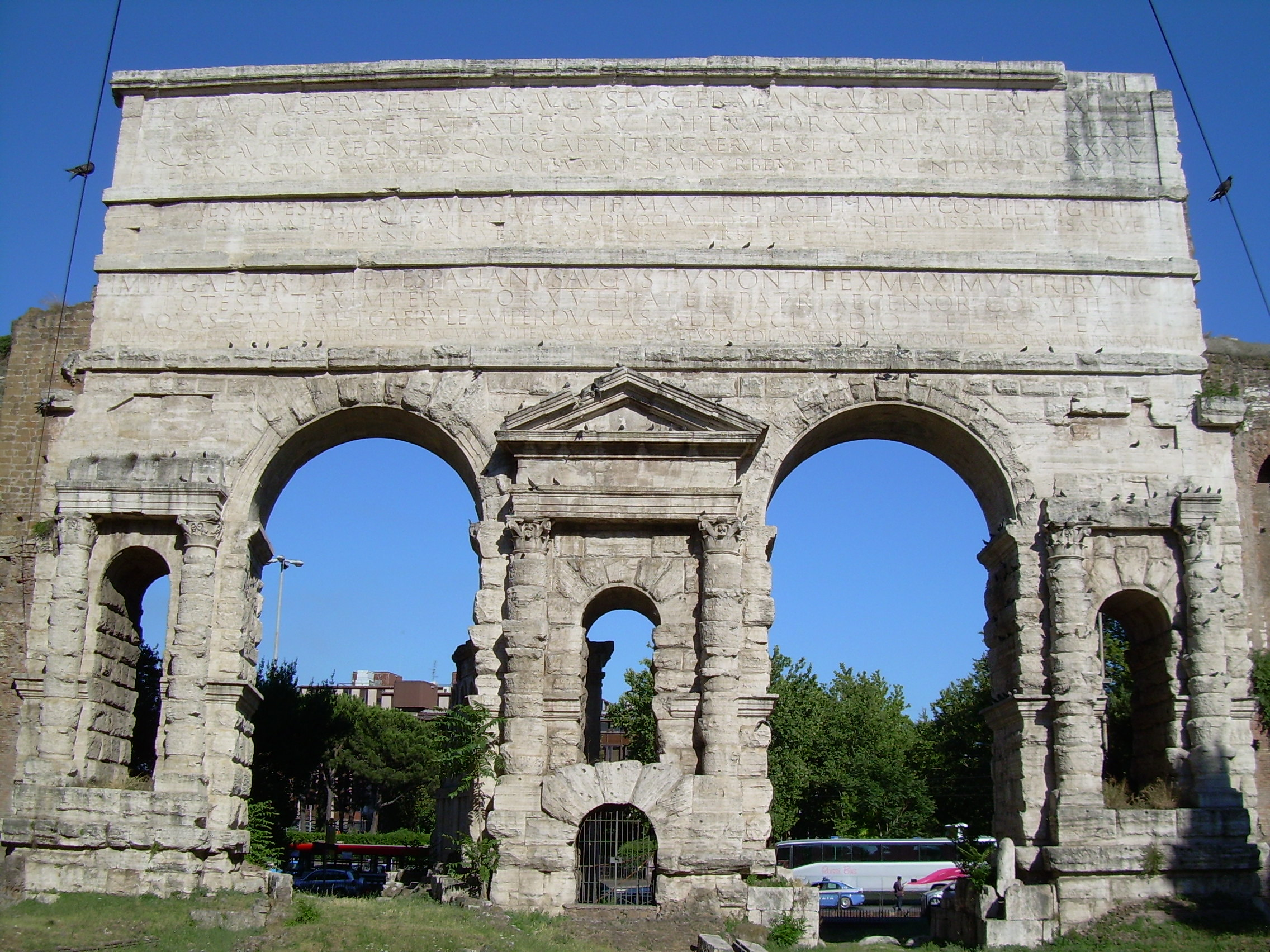 Porta Maggiore, Roma. CIL VI 1256–1258.